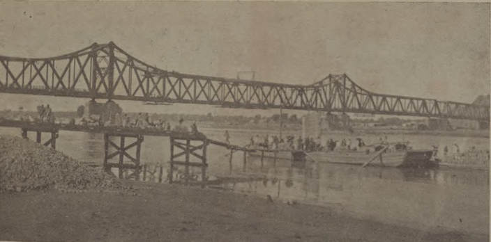 题名： 濟南濼口黃河鐵橋：[照片] 作者： 張敬一 文献来源： 《图画时报》 出版时间： 1929 年 卷期(页)： [ 第568期 ，2页 ]